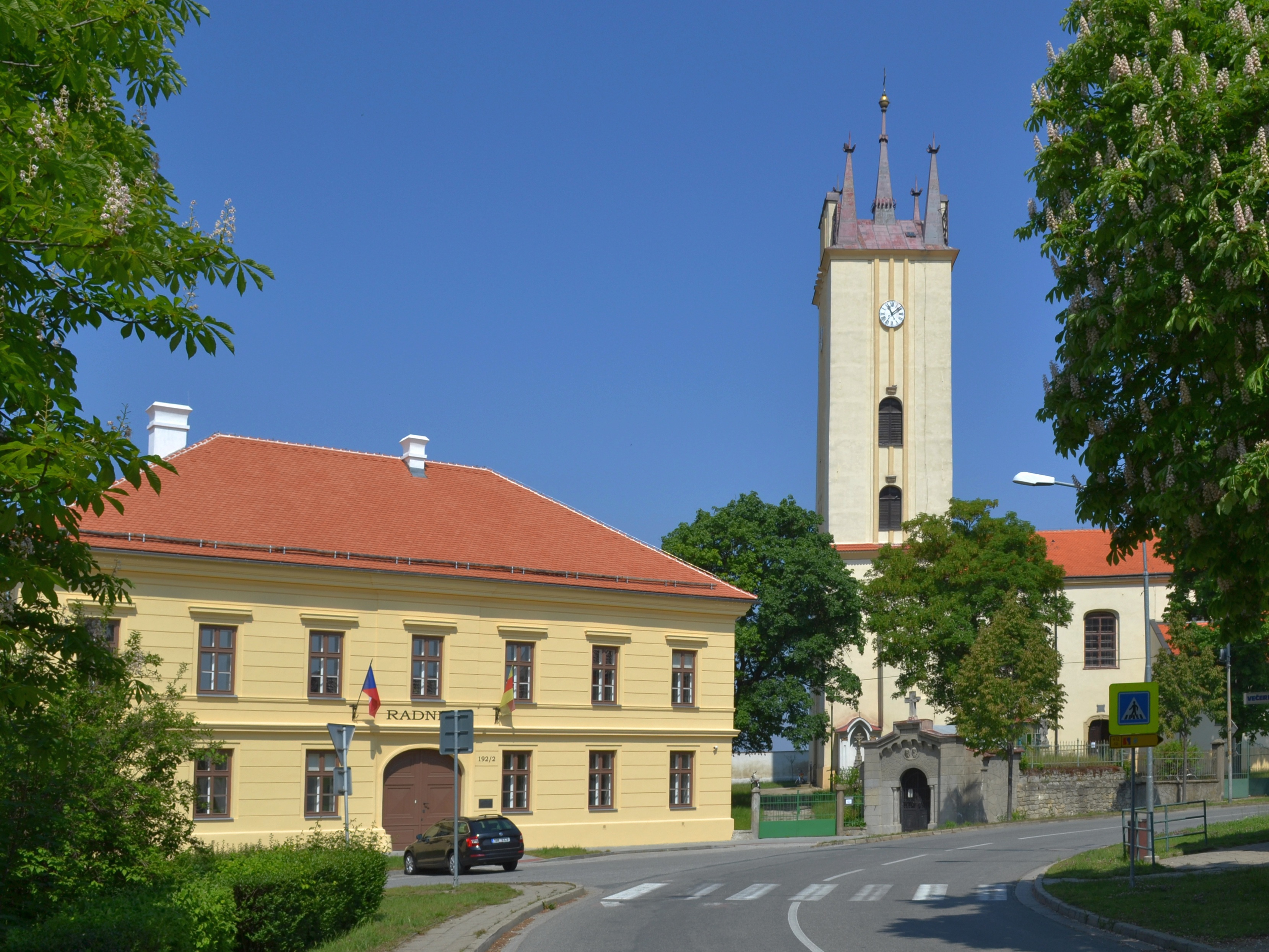 Podivín - radnice a kostel